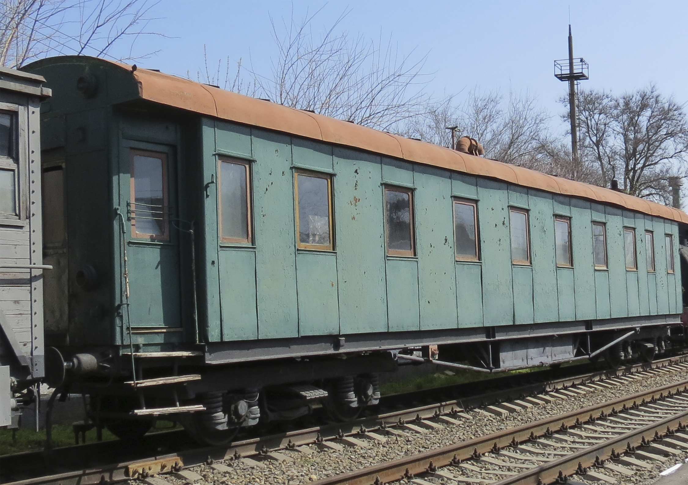 Вагон построен в 1938 году Тверским вагоностроительным заводом